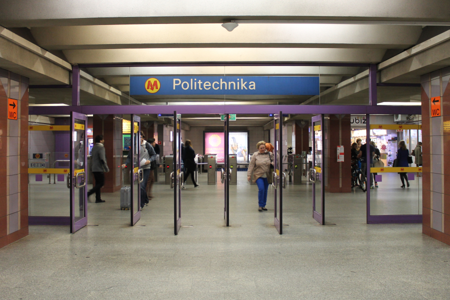 Północna hala odpraw stacji metra A11 Politechnika.